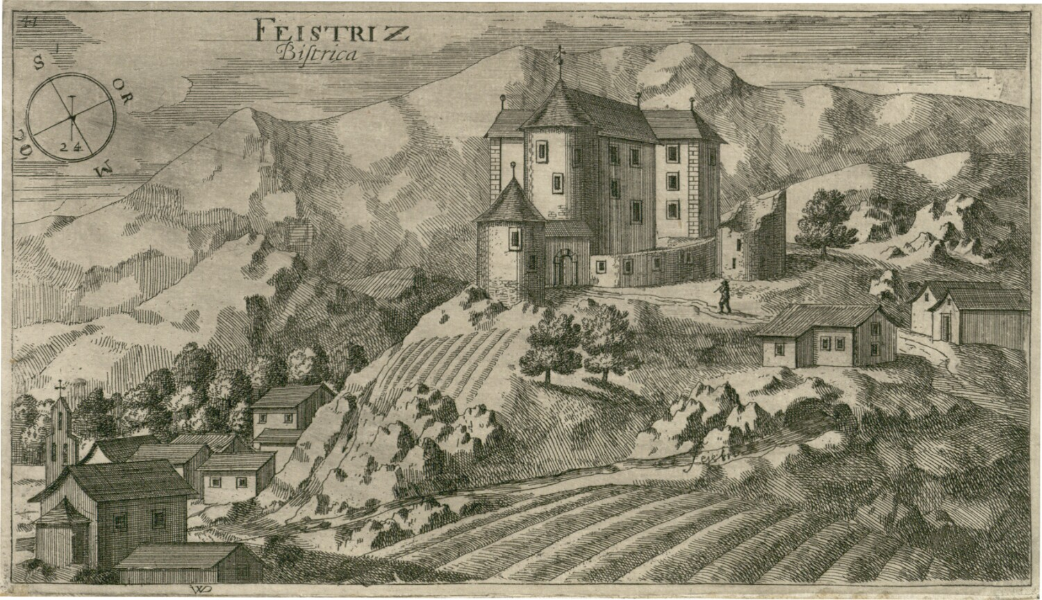 Grad Gradina (Feistritz)